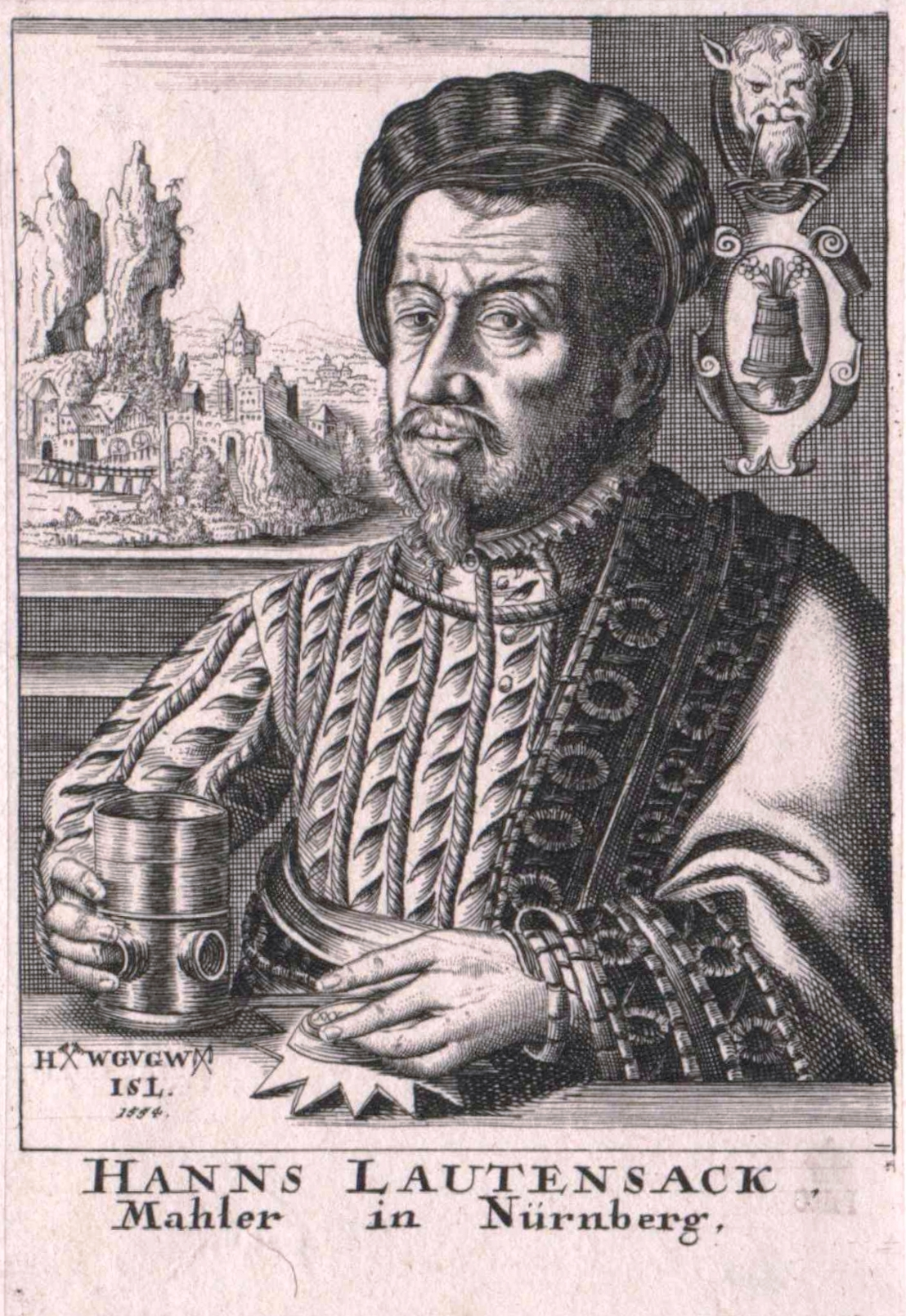 Selbstbildnis Hans Lautensack (* 1524)